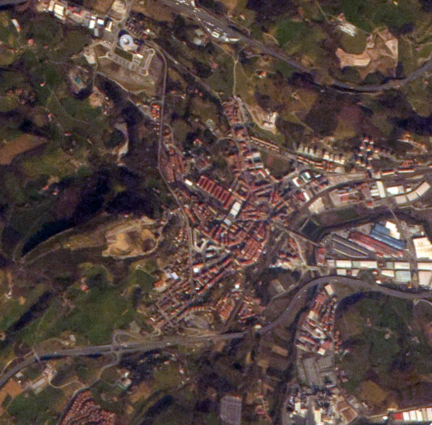 Hernaniko irudia, Thomas Pesquet astronautak Nazioarteko Espazio Estaziotik egina. Argazkiaren kolore aldaketa eta mozketa nire lana da.